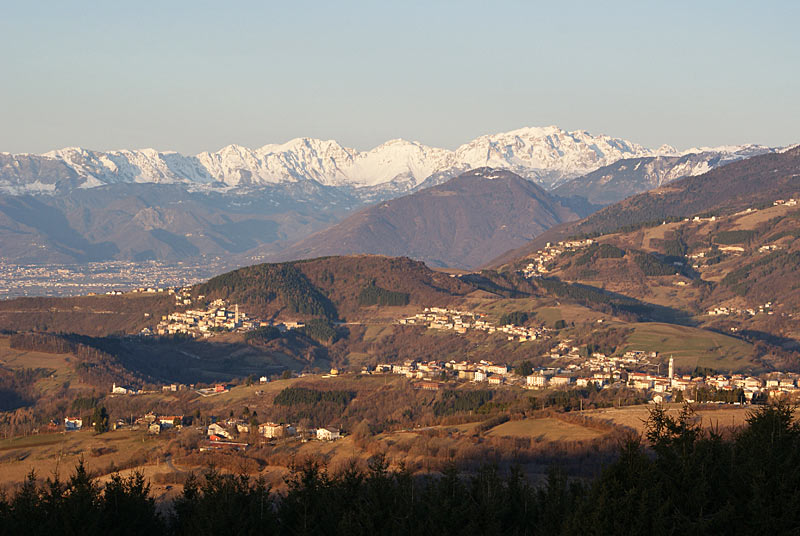 Panorama di Conco e di Lusiana. Sullo sfondo Monte Summano e Piccole Dolomiti.